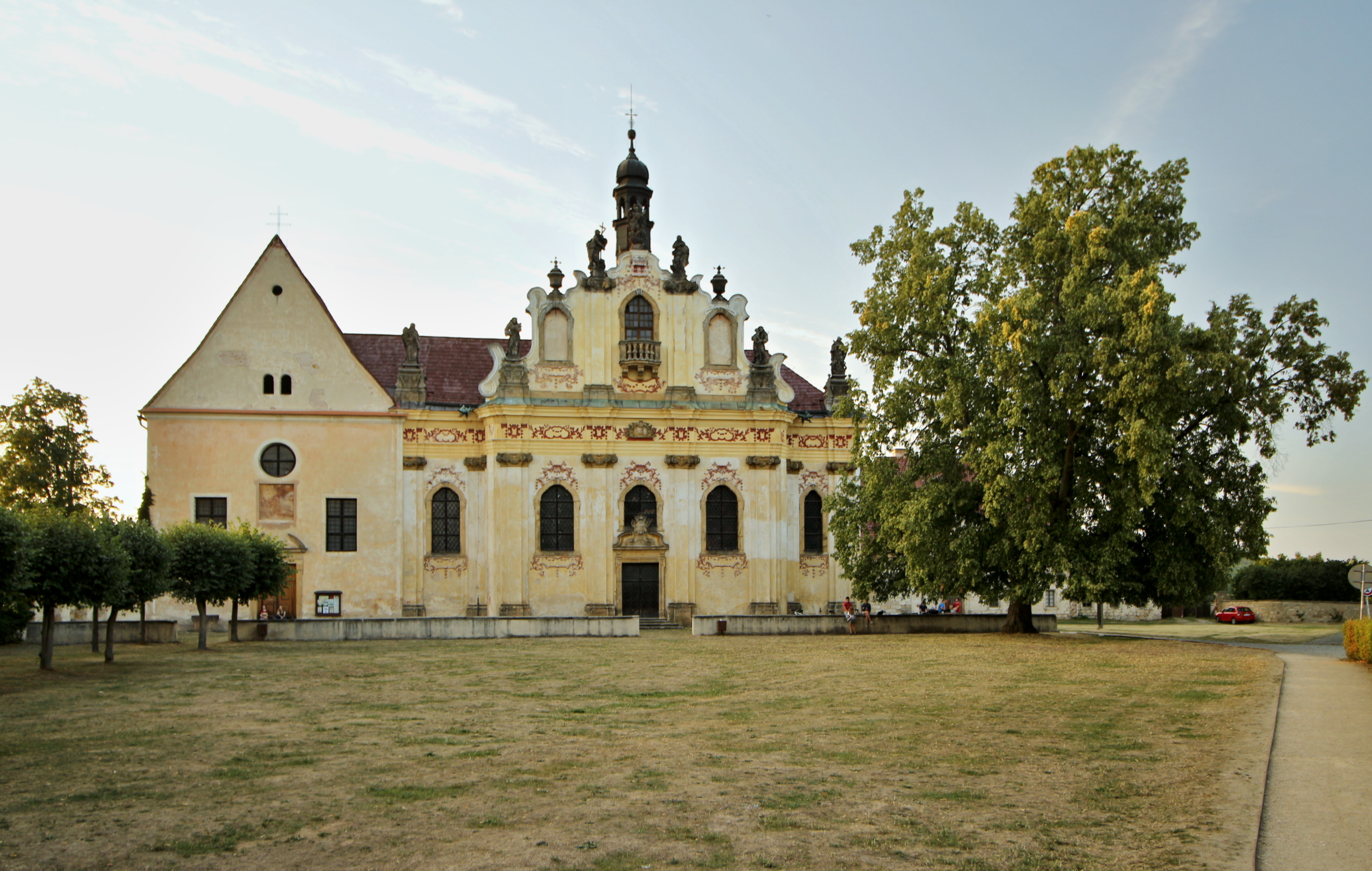 Mnichovo Hradiště